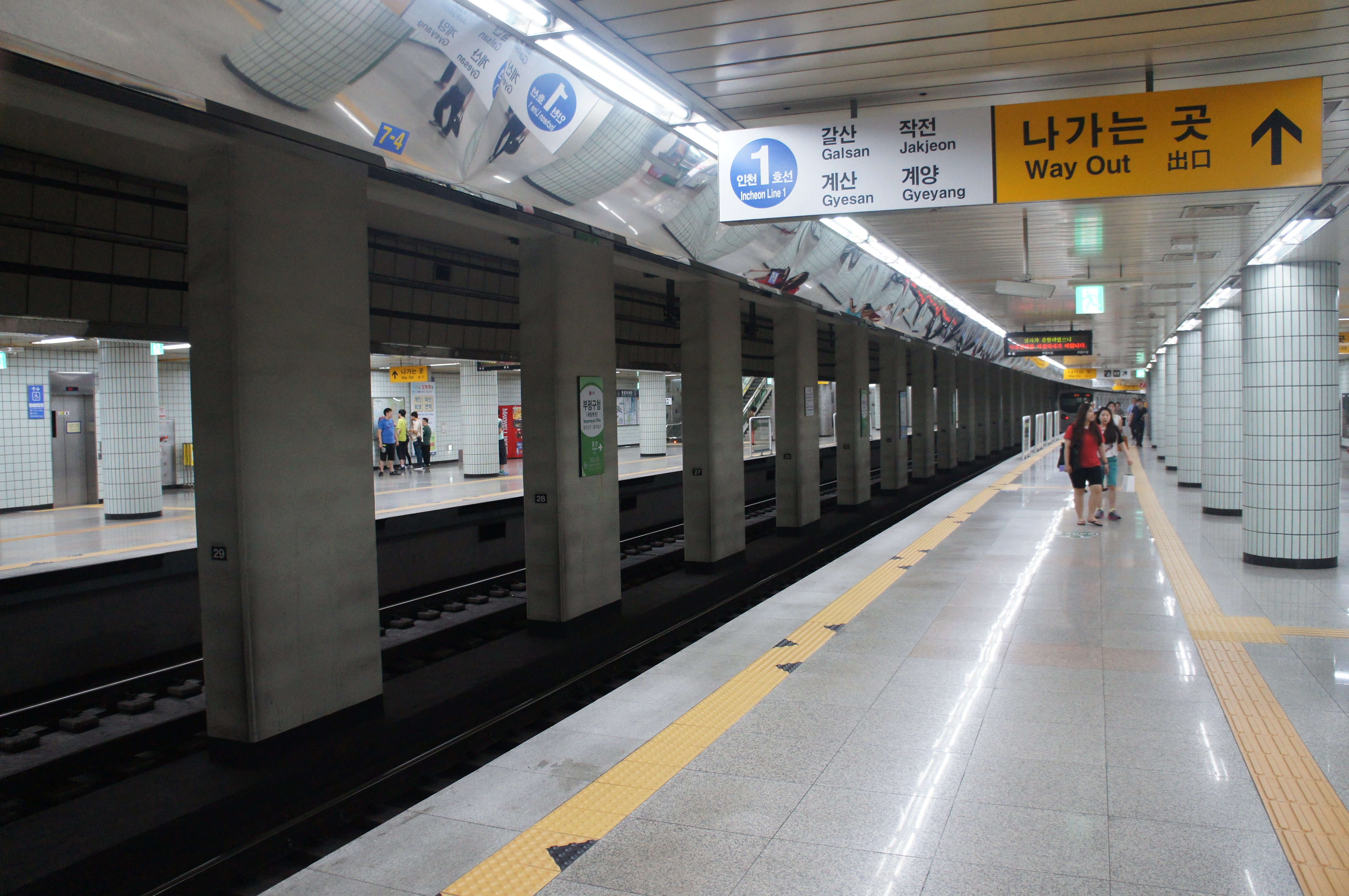 인천1호선 부평구청역 승강장